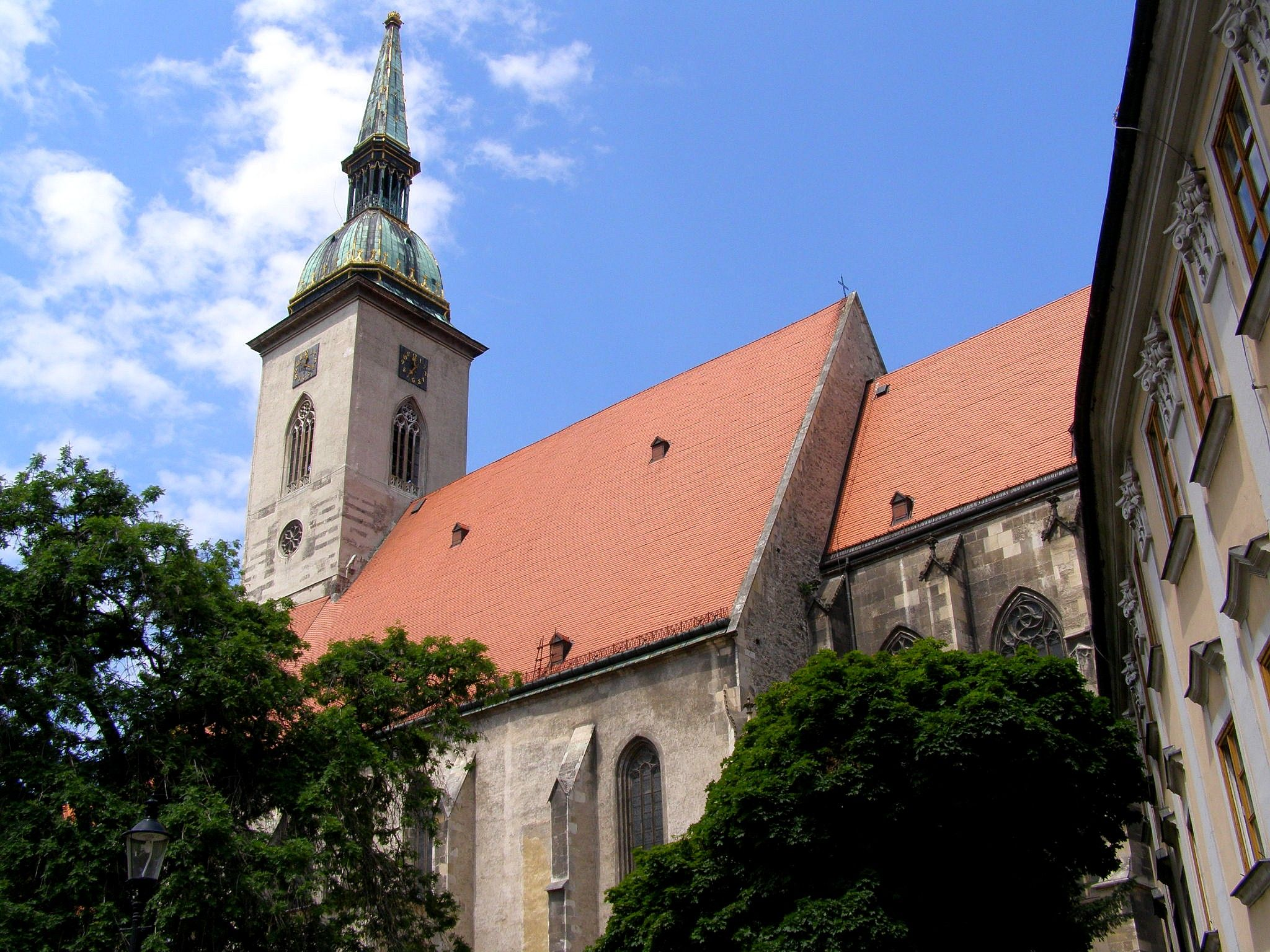 Pohľad na katedrálu sv. Martina z Rudnayovho námestia